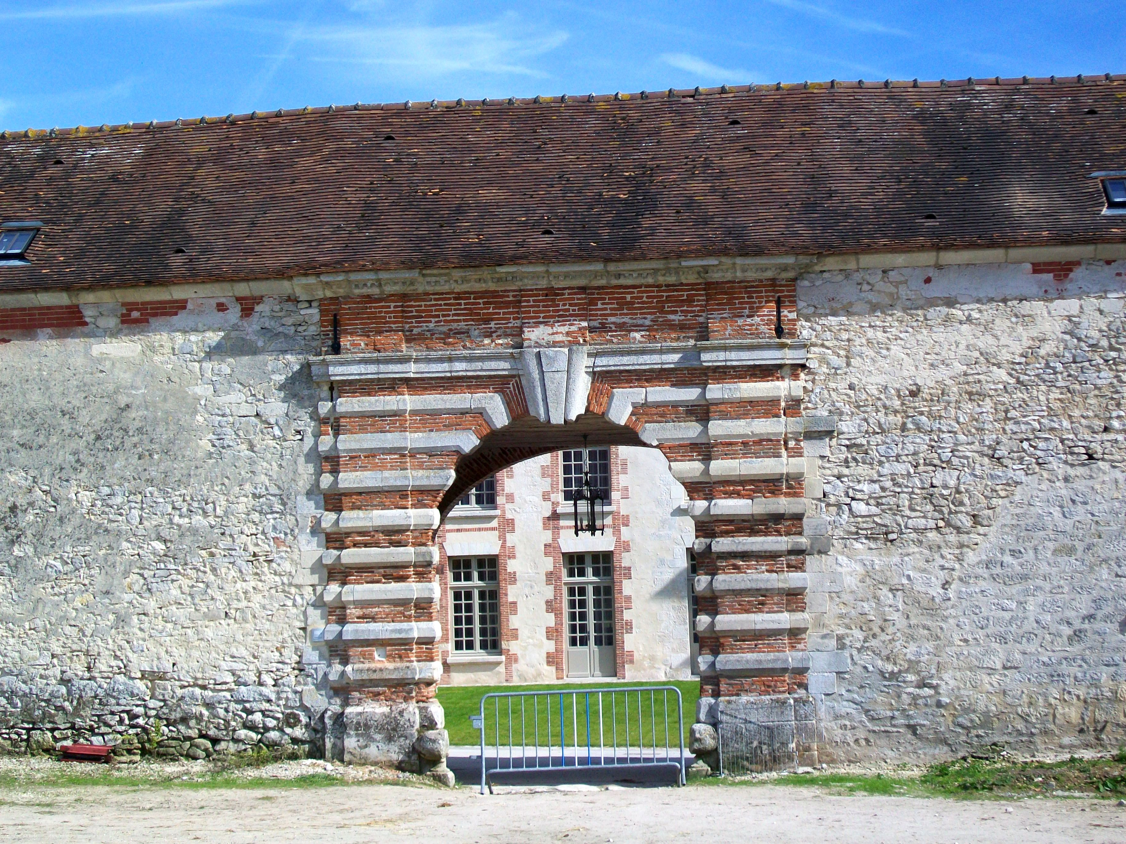 Le portail de la ferme de l'abbé, qui date du XVIIe siècle.